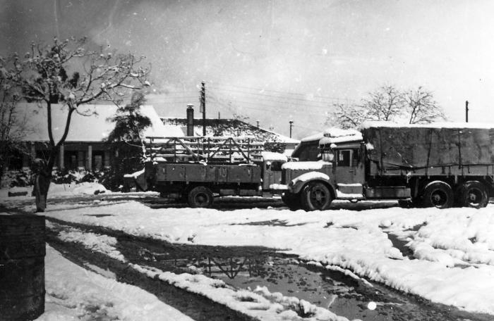 השלג בגן-שמואל שנת 1950 - בחצר הגדןלה. שתי משאיות המק חונות -המק הירוק והמק האדום. ברקע - חדר האוכל וארובת המטבח